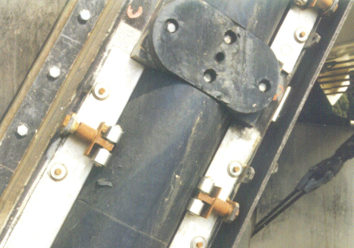 Canal du Midi: Wasserkeilhebewerk Fonserannes: Dichtleiste am Schild